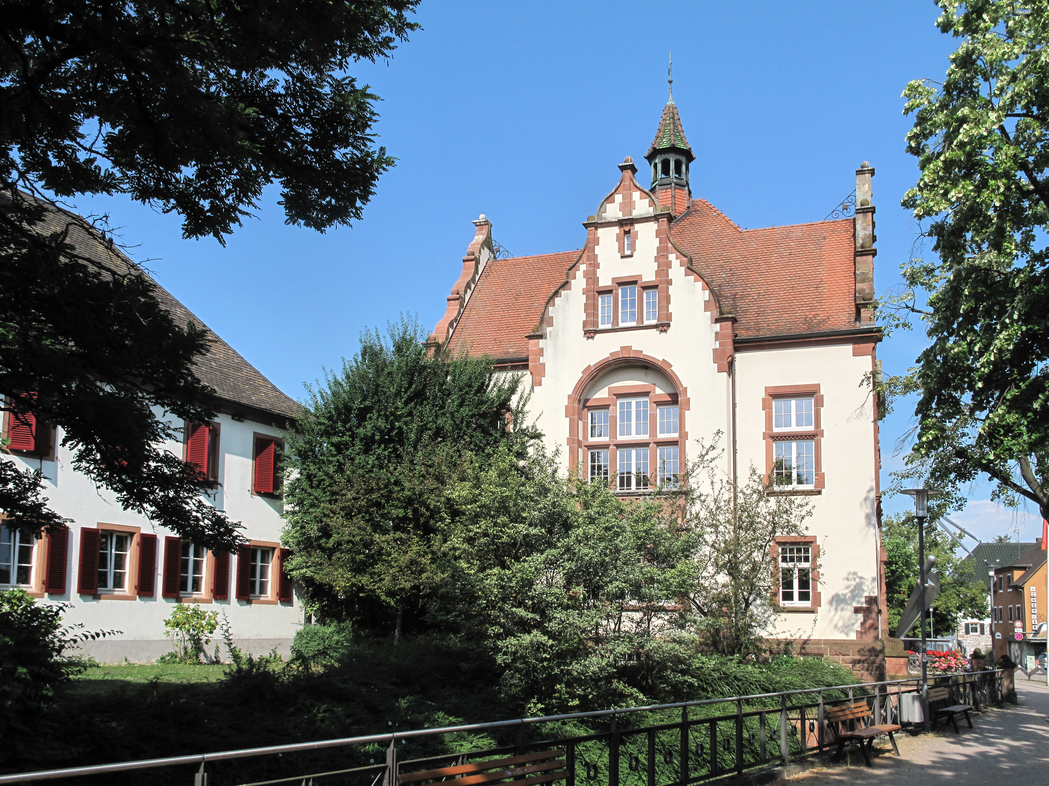 Denzlingen, das Alte Rathaus